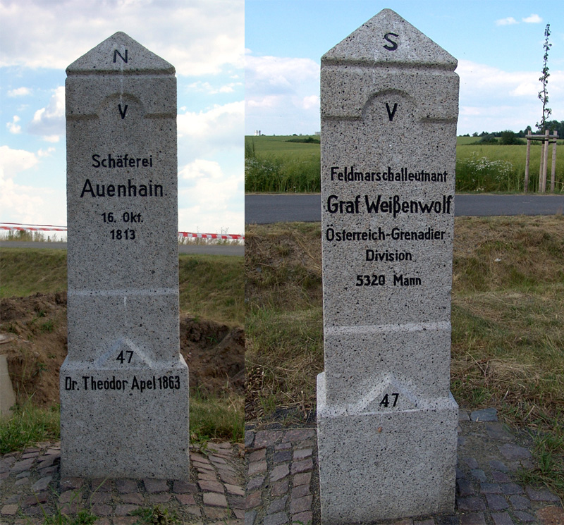 Summary Bildbeschreibung: Apelstein 47 zur Erinnerung an die Völkerschlacht bei Leipzig Quelle: selbst fotografiert Fotograf: selbst fotografiert Datum: 1. Juli 2006